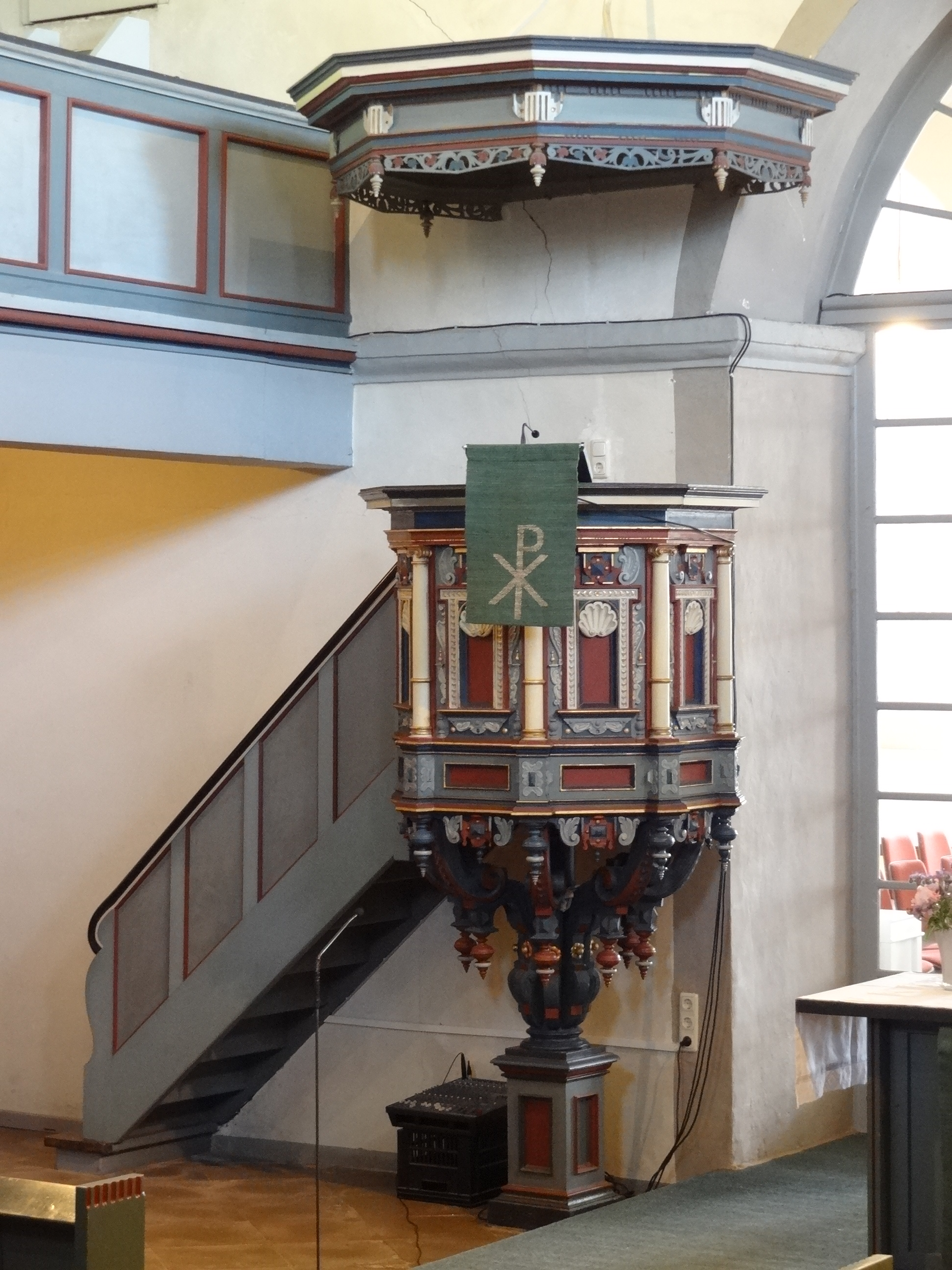 Evangelische Pfarrkirche (Münster, Butzbach)